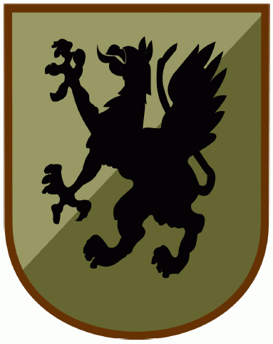 Inspektorat Wsparcia Sił Zbrojnych – oznaka rozpoznawcza na mundur polowy – 2013, Polska.